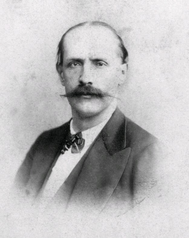 Daguerrotipo de Francisco Javier León